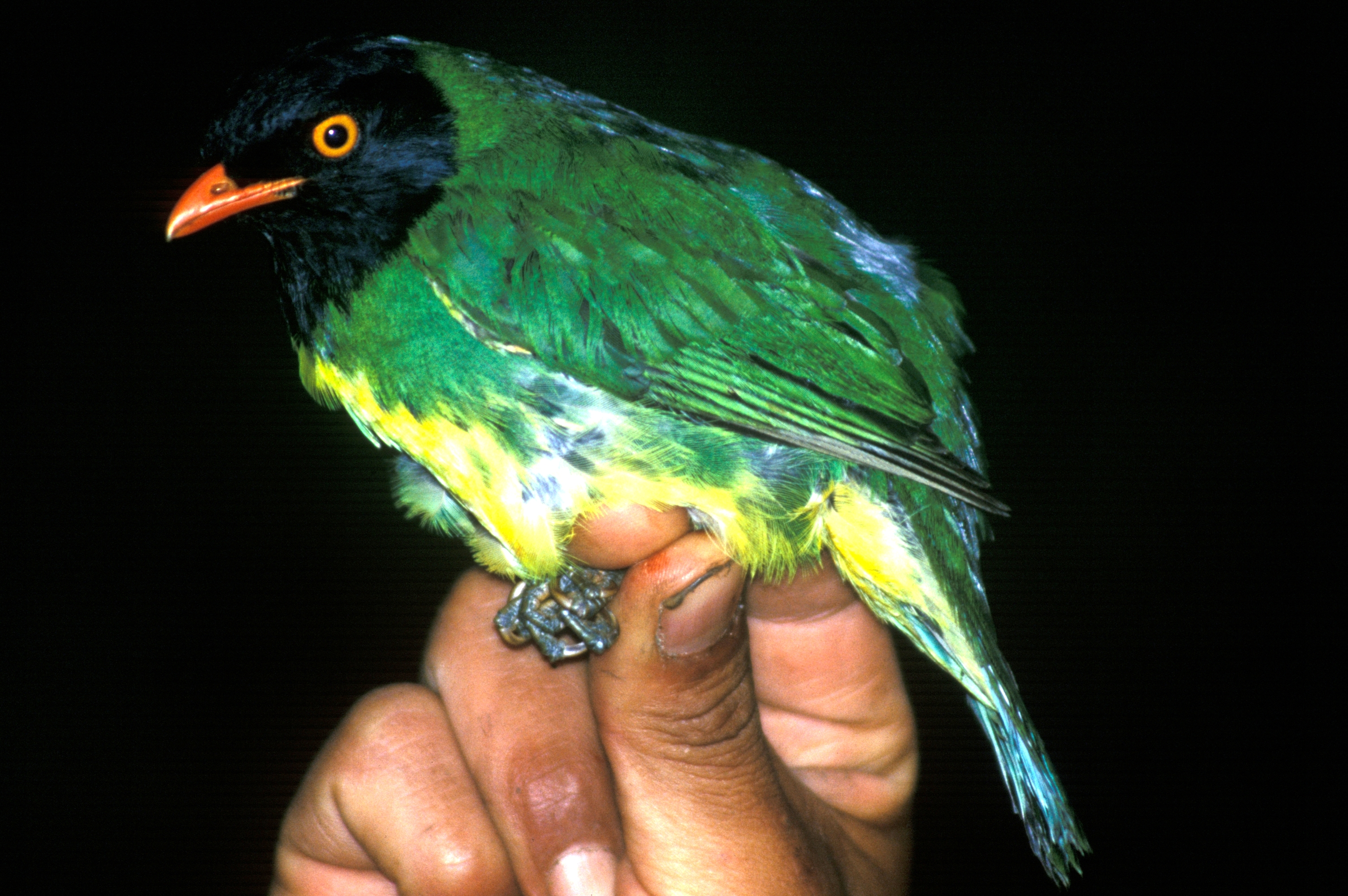 Black-chested Fruiteater (Pipreola lubomirskii) in Ecuador